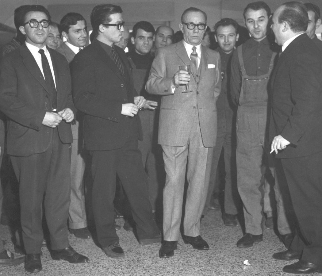 editore, produttore cinematografico e filantropo italiano